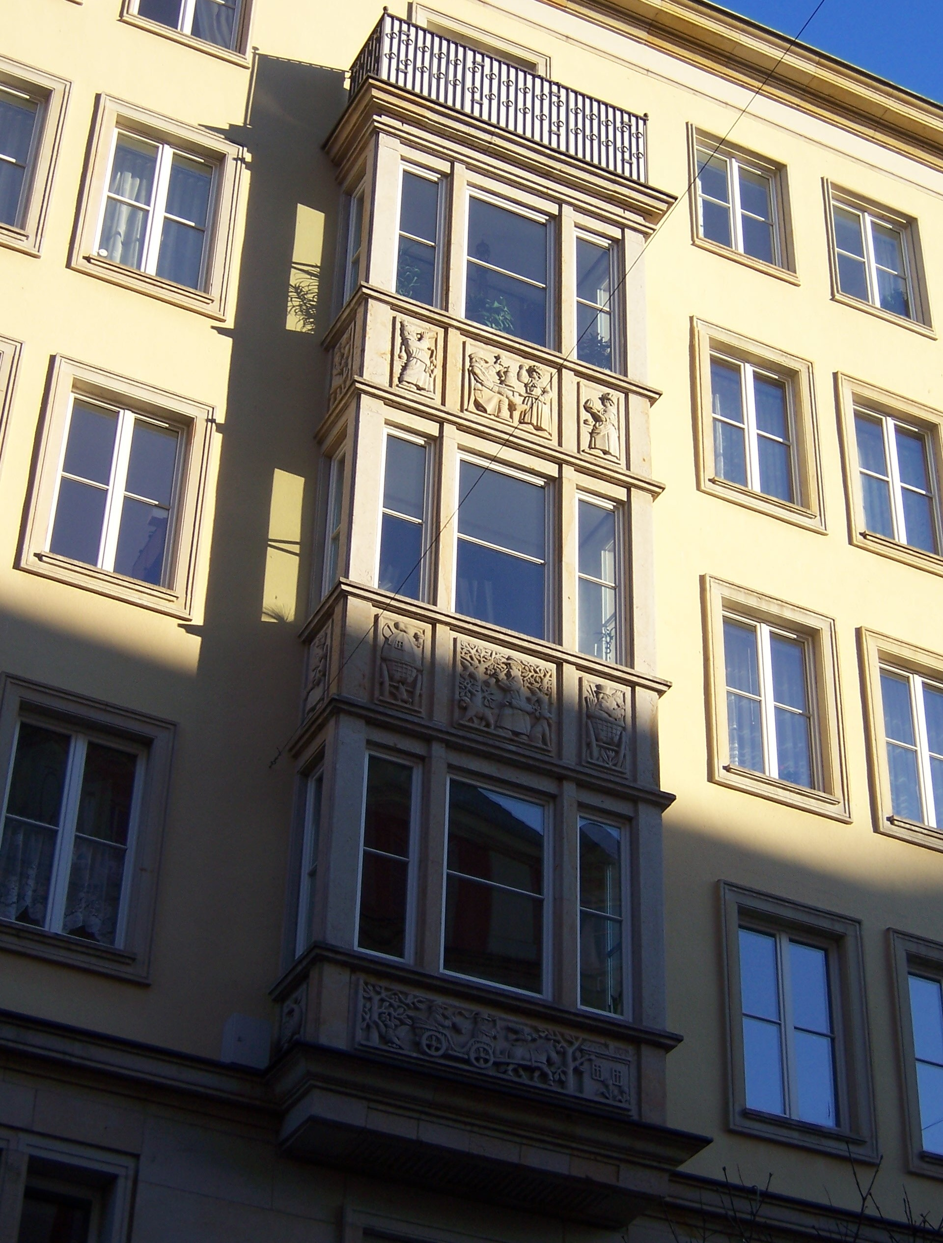 Erkerreliefs von Hermann Naumann; Erker im Innenhof Weiße Gasse beim Gänsediebbrunnen in Dresden.